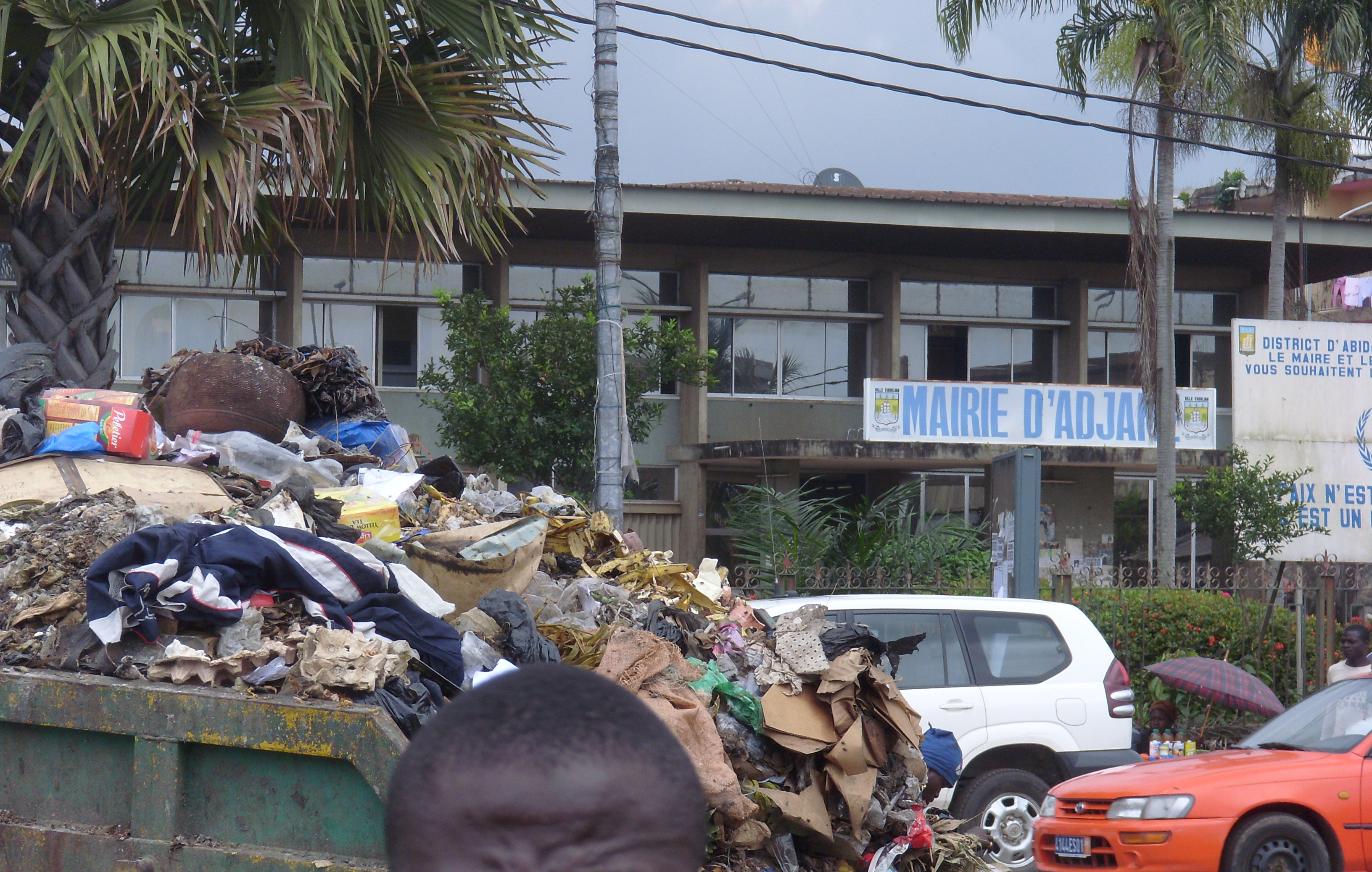 Devant la mairie d'Adjamé (Abidjan, Côte d'Ivoire) au cœur du marché, les yeux et le nez sont saisis par les collines de déchets.